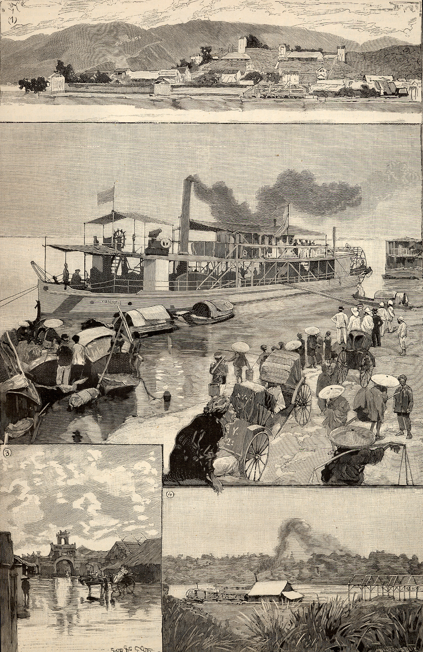 Views of Hanoi and the Tonkin, published in Le Monde Illustré in 1891. Panorama of Lac-Kaï, French outpost in China Yun-nan, in the quay of Hanoi Flooded street of Hanoi Landing stage of Hanoi Français Colonies - Tonkin - Sur le fleuve Rouge. Panorama de Lac-Kaï, poste français de Chine. Le Yun-nan, au quai d'Hanoï Rue de Hanoï inondée Embarcadère de Hanoï Español Hanoi y Tonkin. Le Monde Illustré, 1891. Panorama de Lac-Kaï, avanzada francesa en China. Yun-nan, en el muelle de Hanói. Calle inundada en Hanói. Desembarcadero en Hanói 中文 法蘭西第二殖民帝國（1830至1960年）的殖民地，於1891年在Le Monde Illustré出版。 Lac-Kaï的全景畫，法國在中國的基地 Yun-nan，在河內的碼頭 河內被淹沒的街道 河內的登陸台